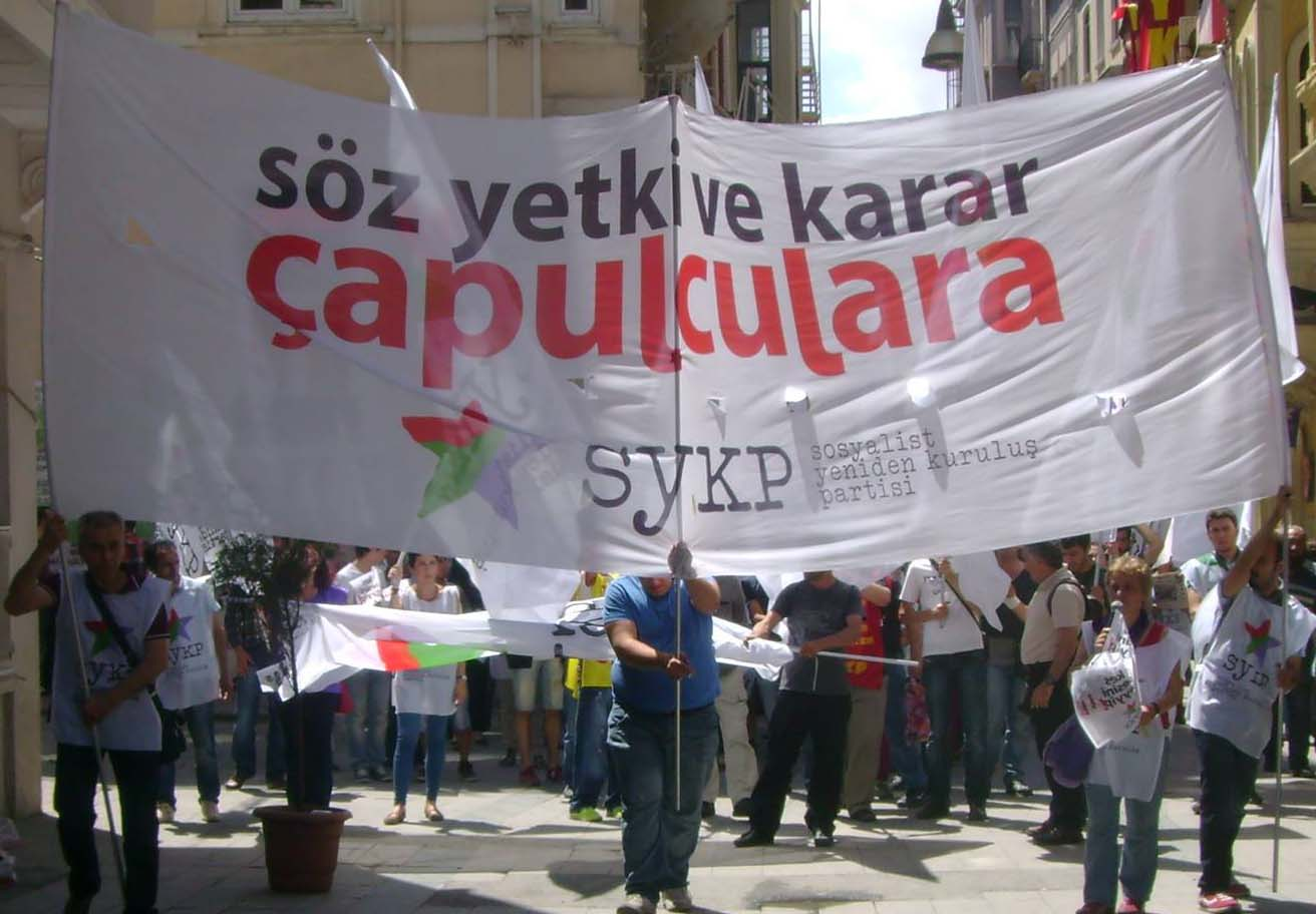 Sosyalist Yeniden Kuruluş Partisi eylemi